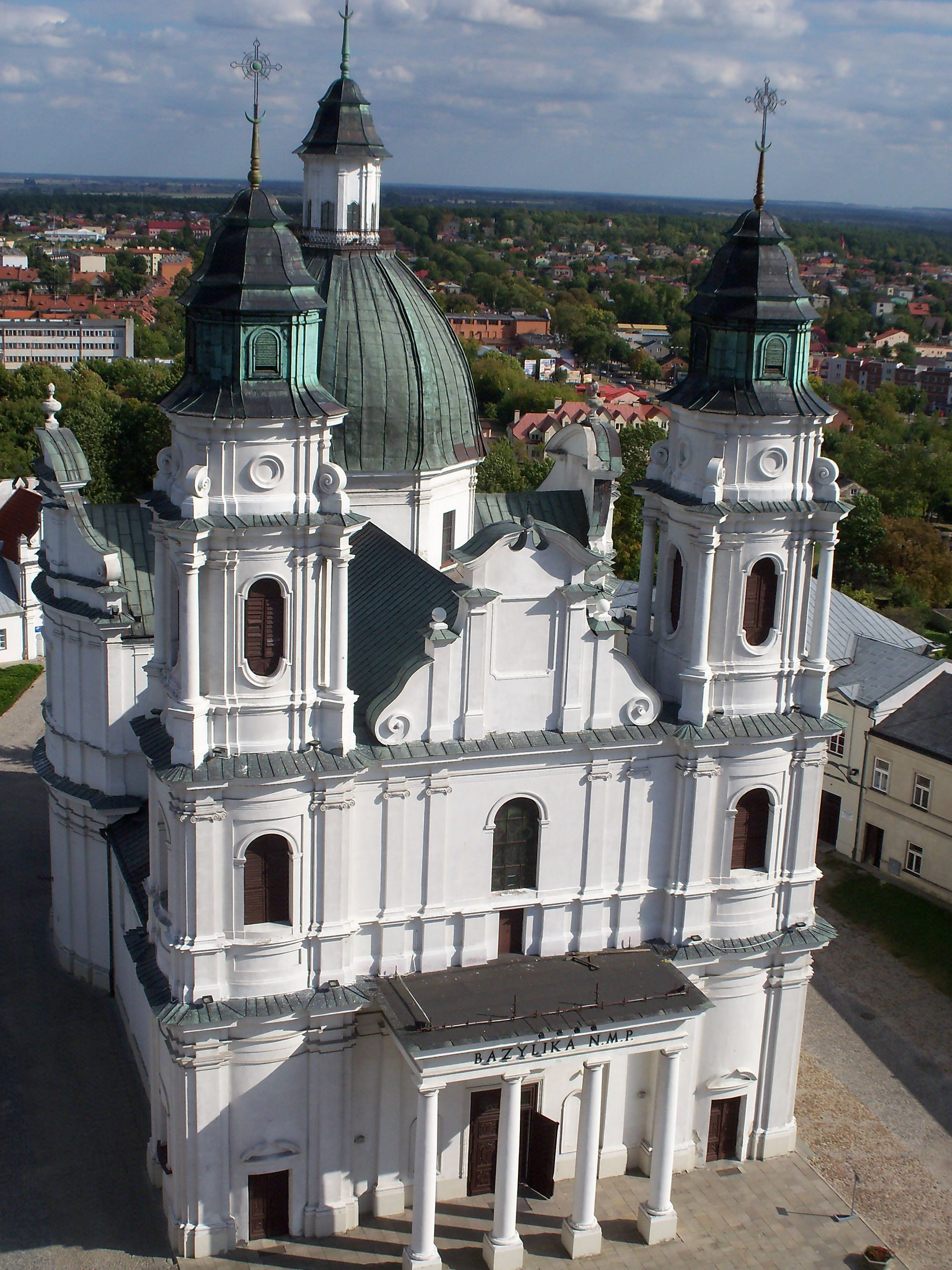 Zespół katedry greckokatolickiej „Górka Katedralna” Bazylika p.w. Narodzenia NMP